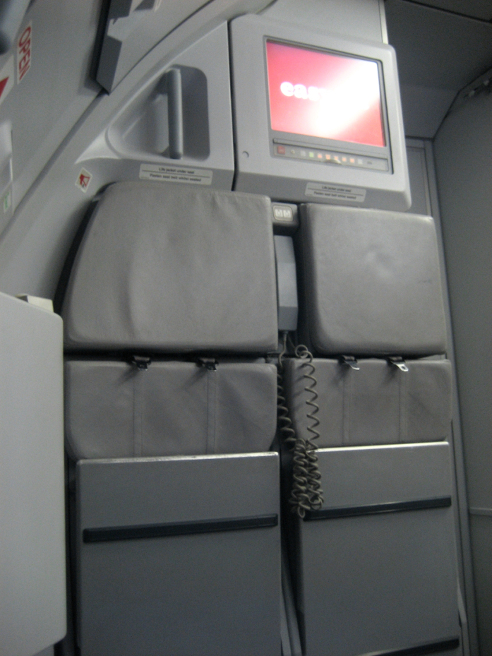 A319 LCD Forward Attendant Panel